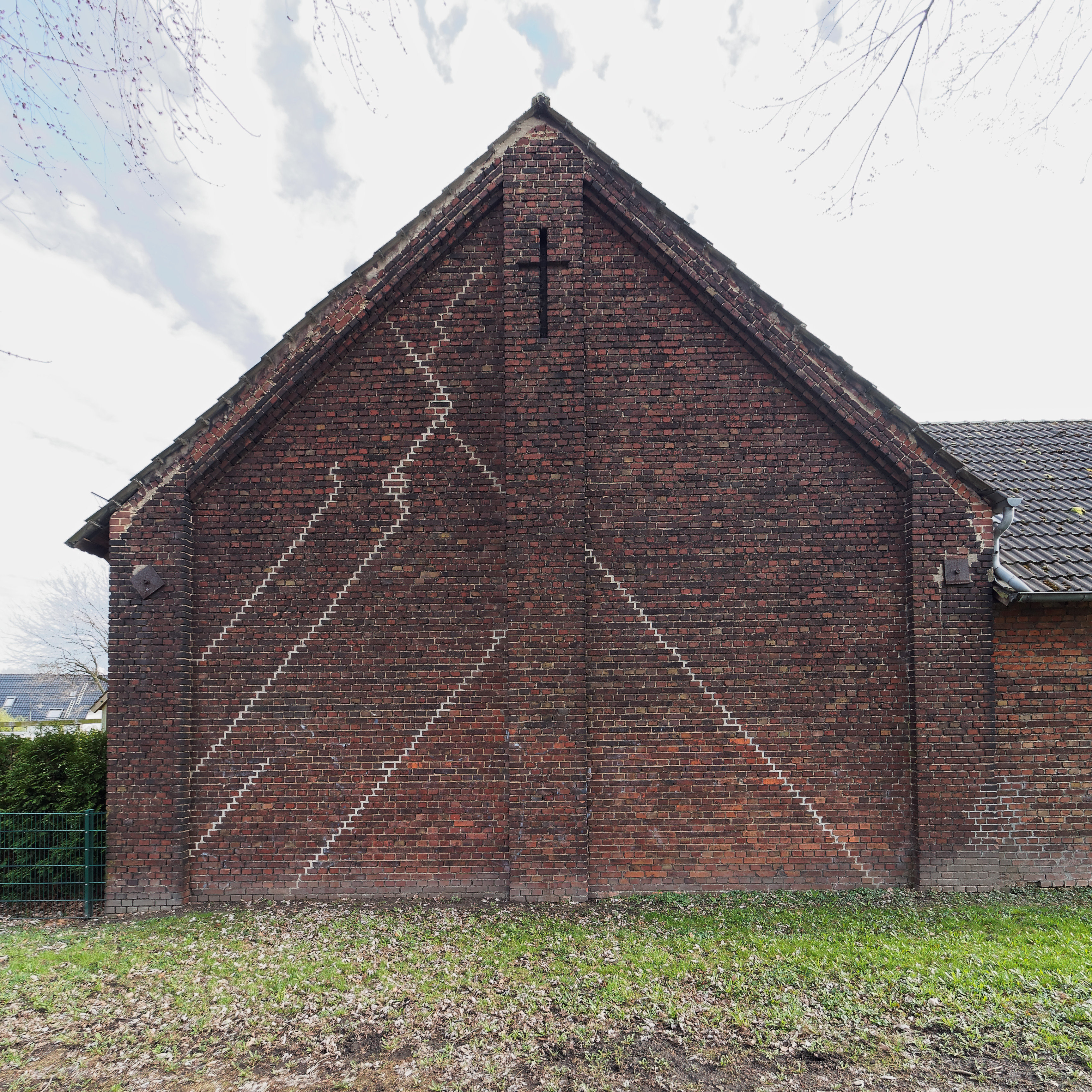 Setzungsrisse, teilweise verfugt, in einer Scheunenenwand. Börsinghauser Strasse, Holthausen, NRW, Deutschland